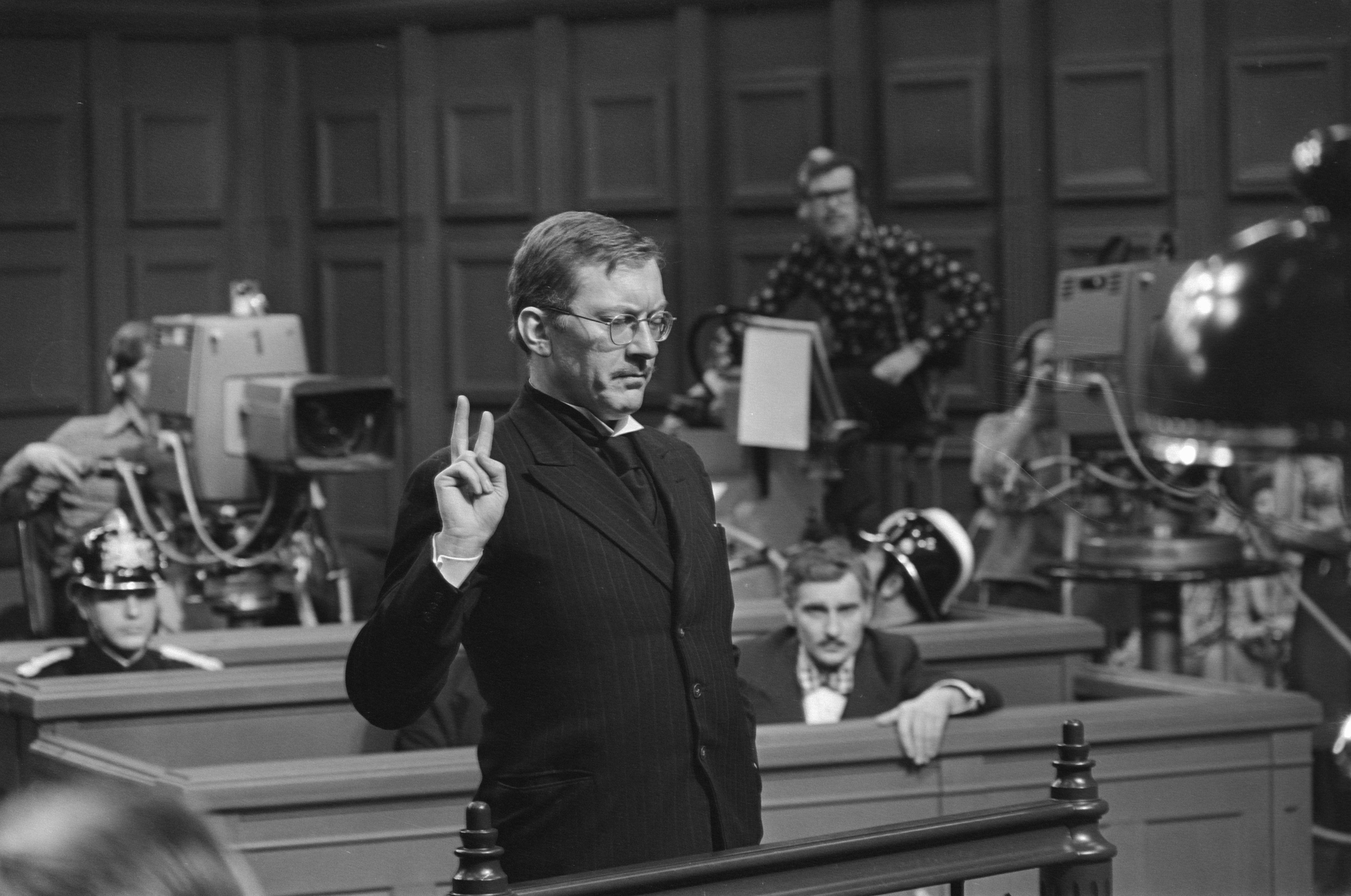 Collectie / Archief : Fotocollectie Anefo Reportage / Serie : [ onbekend ] Beschrijving : TV: Gieszen/Nieuwkerk (VARA), links Edmond Classen ( Van Dijk ) Datum : 7 januari 1976 Trefwoorden : TV-opnamen Fotograaf : Mieremet, Rob / Anefo Auteursrechthebbende : Nationaal Archief Materiaalsoort : Negatief (zwart/wit) Nummer archiefinventaris : bekijk toegang 2.24.01.05 Bestanddeelnummer : 928-3503